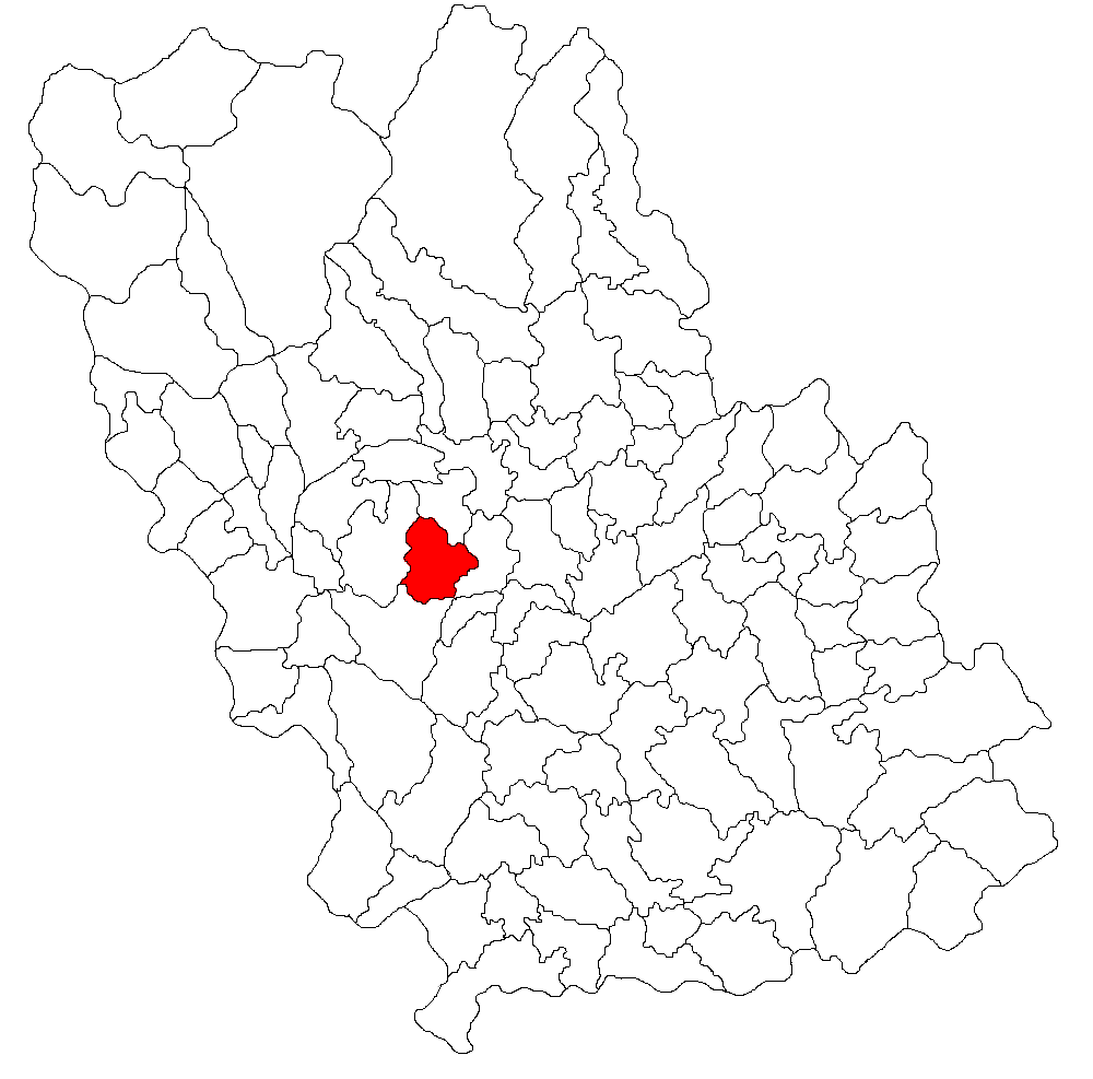 Categorie:Hărţi ale judeţului Prahova